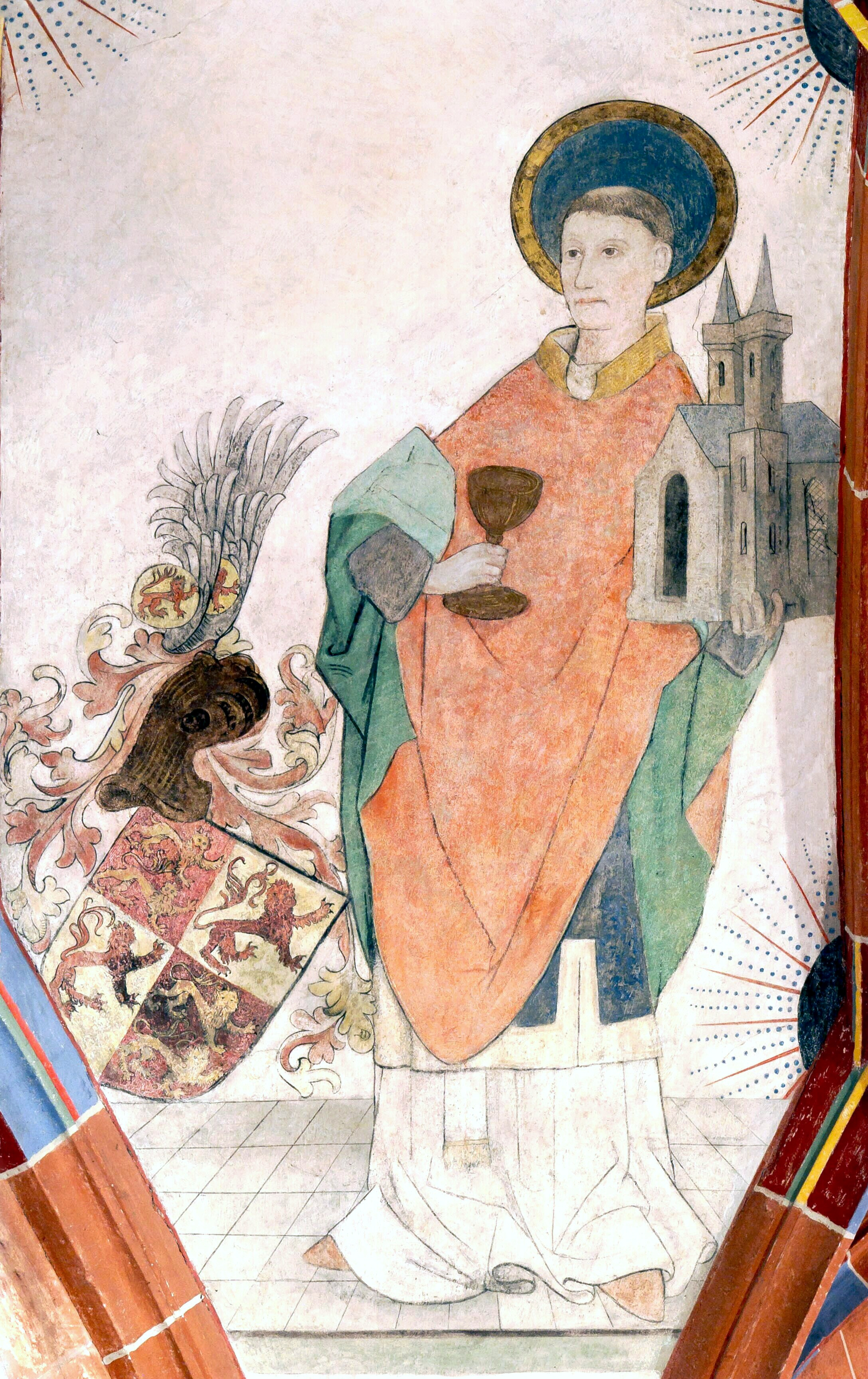 Spätgotische Deckenmalerei des Heiligen Goar in der Stiftskirche von St. Goar